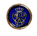 Medaillon van een ereteken in mijn verzameling